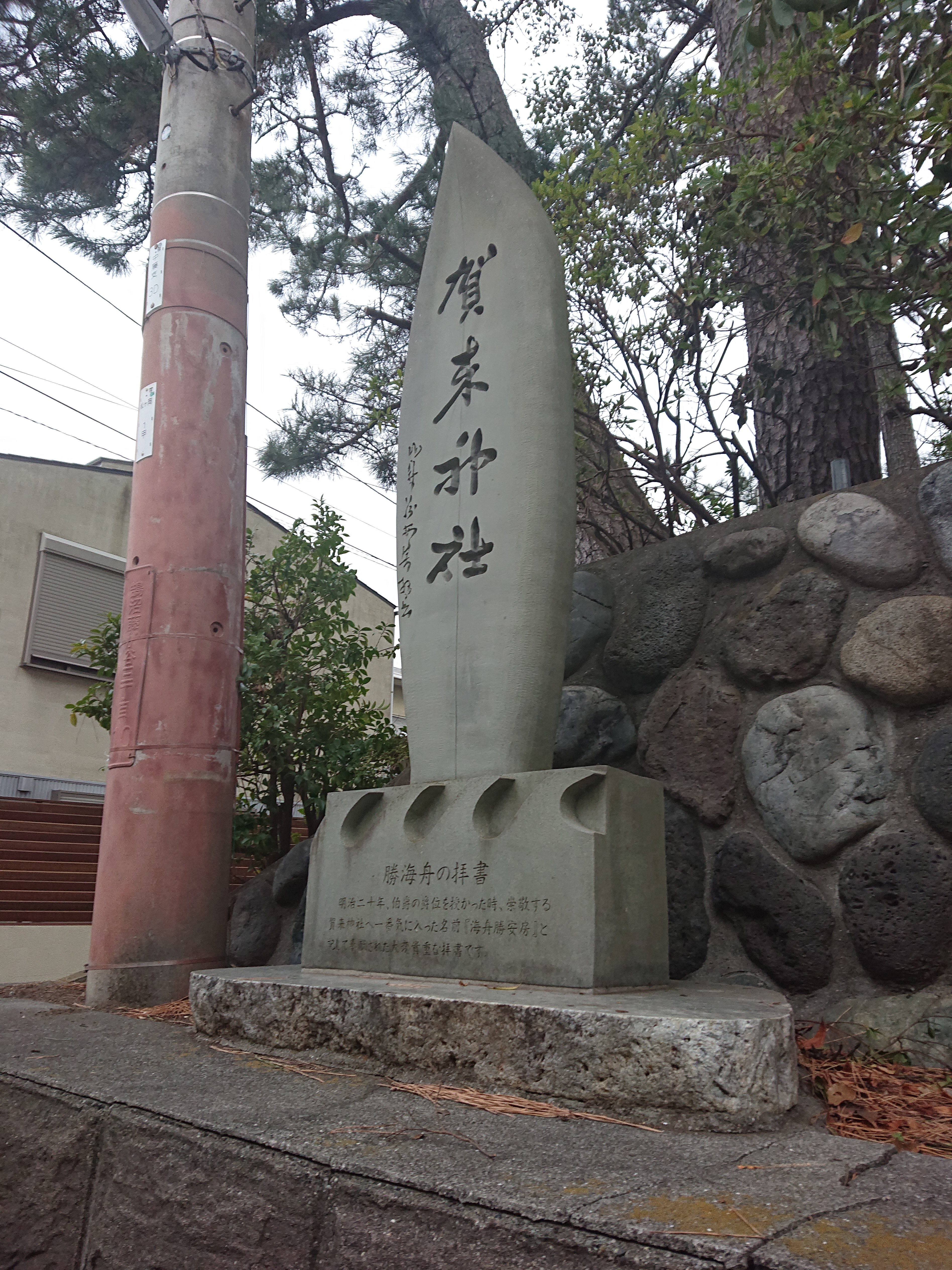 勝海舟の臨書といわれる、銘が彫られた石。賀来神社入口に置かれている。